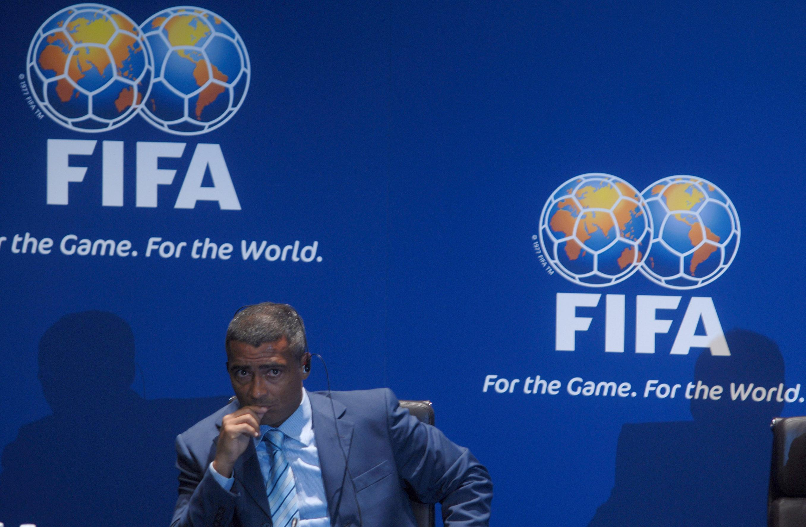 Zurique (Suíça) - O jogador de futebol Romário participa da cerimônia de apresentação oficial da candidatura brasileira à Copa do Mundo de 2014.